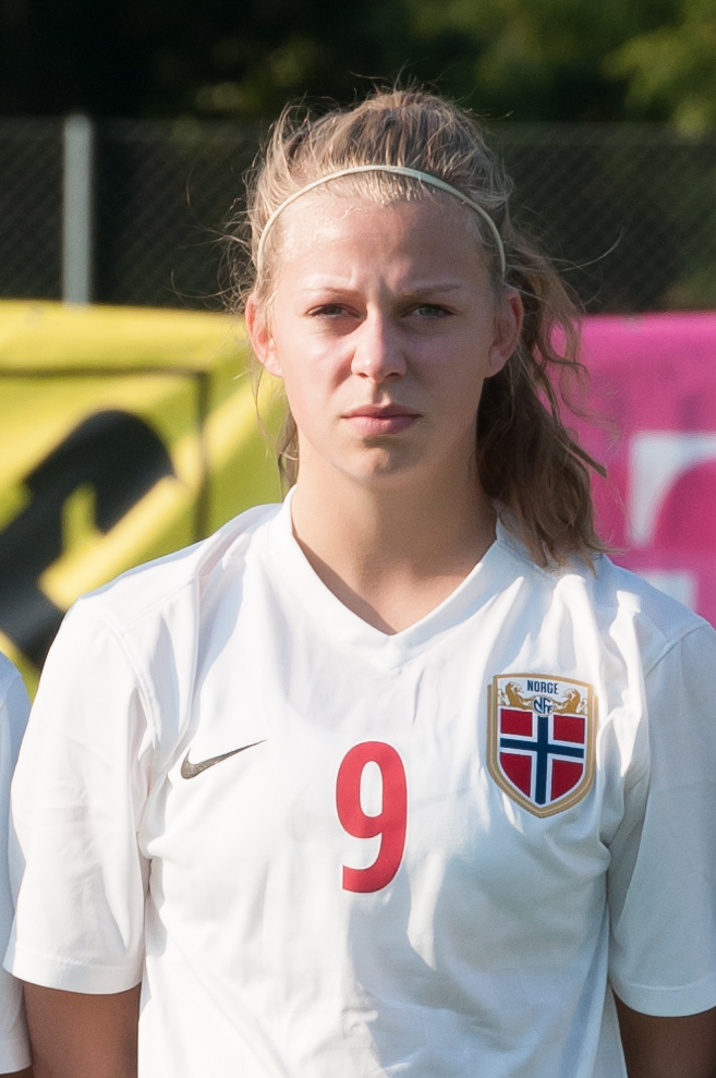 Frauenfußball U19 Testspiel Österreich - Norwegen am 12. August 2015 in Bad Erlach: Ingrid Kvernvolden